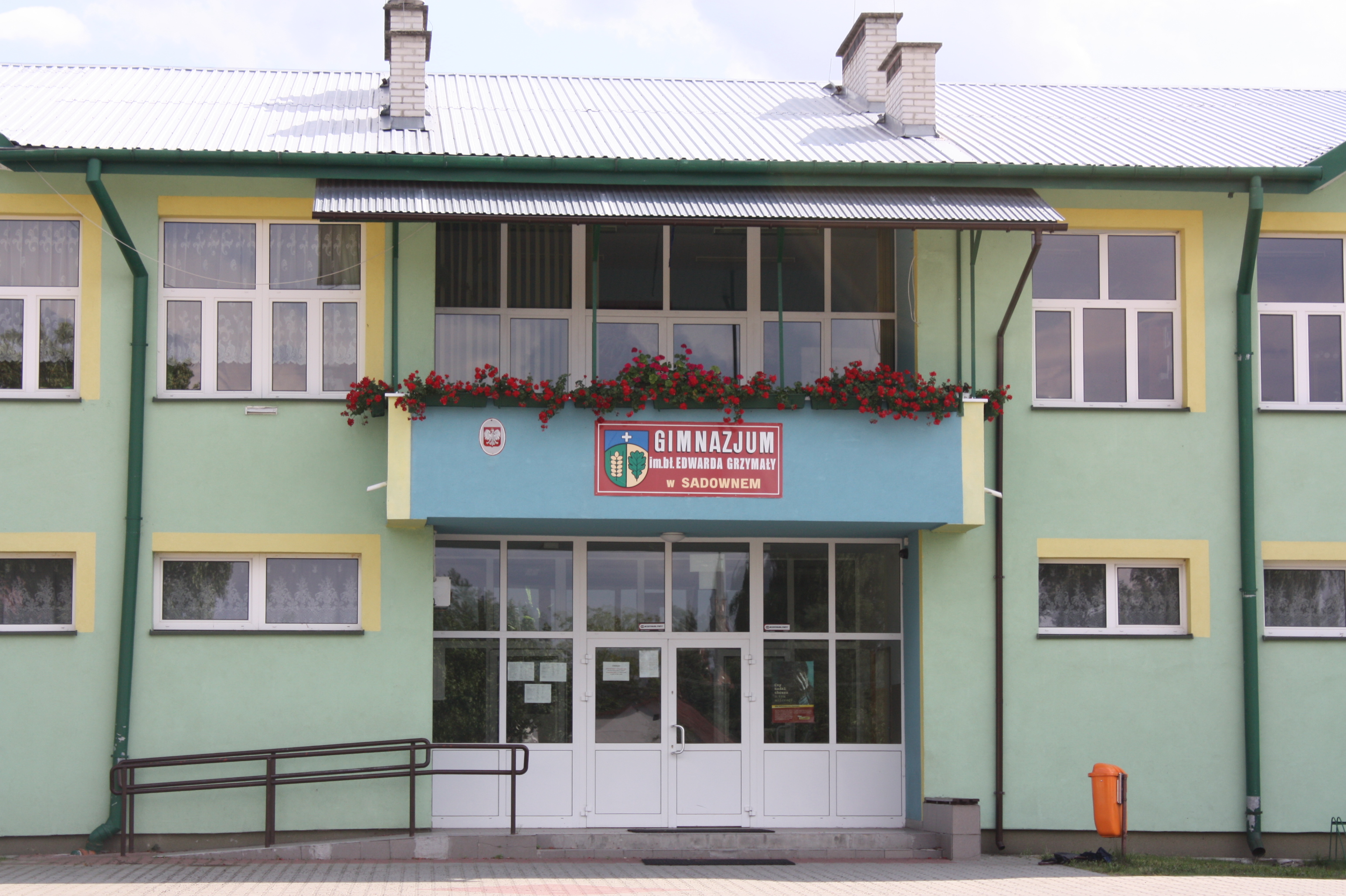 Sadowne Gimnazjum im. bł. Edwarda Grzymały